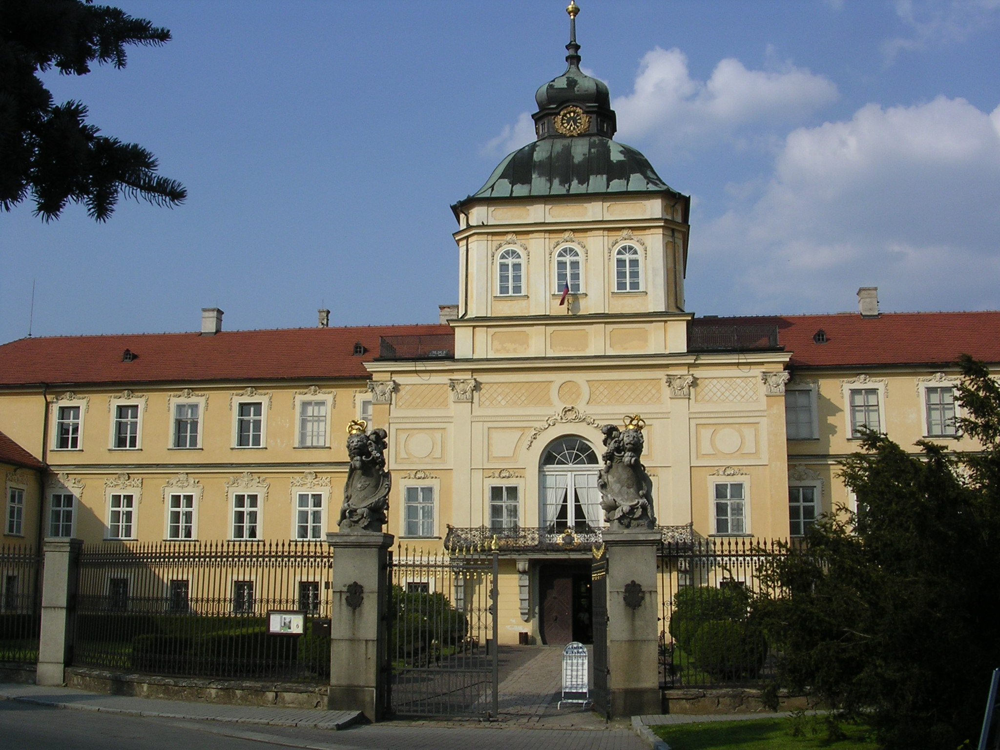 Zámek nový Hořovice, K Nemocnici 22, Hořovice